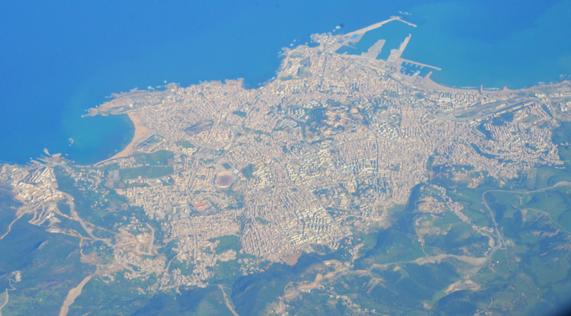 Photo aérienne de la ville de Jijel